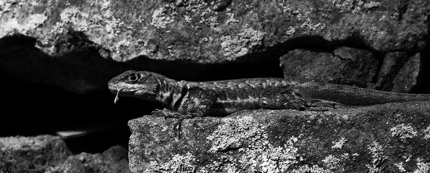 Lagarto do gênero Tropidurus em Araras, distrito de Petrópolis, Rio de Janeiro, Brasil.